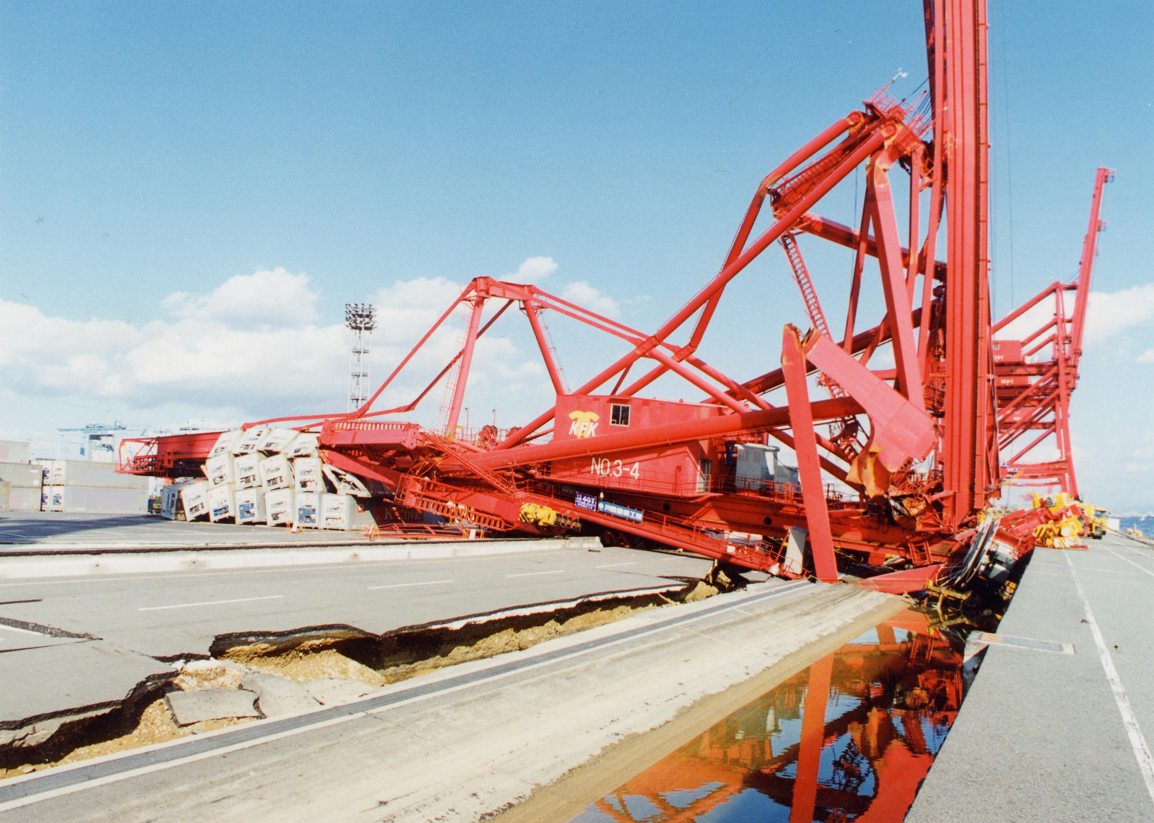 神戸市中央地区 神戸ポートアイランド内のコンテナターミナルで、ガントリークレーンが倒壊。